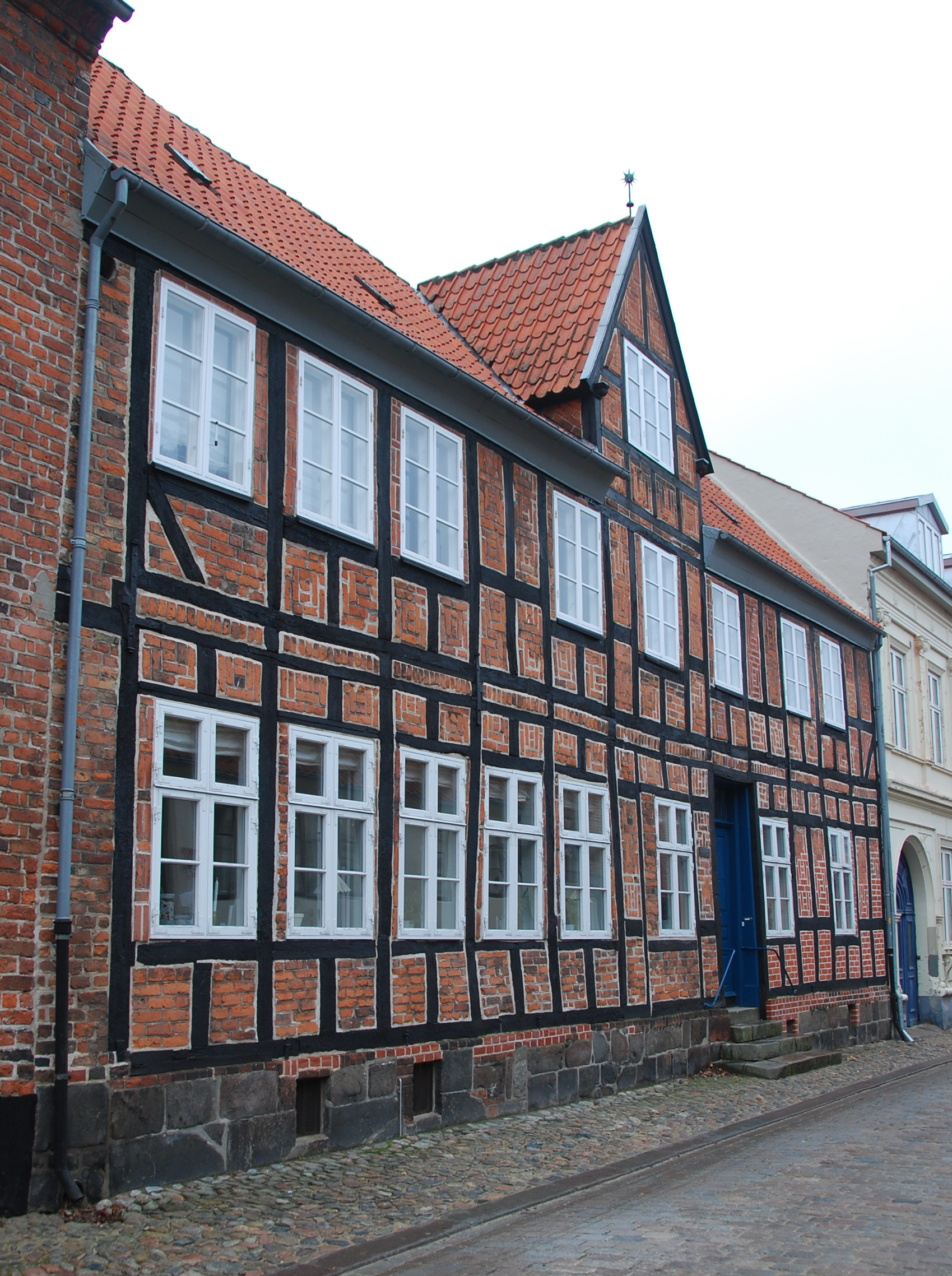 Den fredede bygning "Den gamle præstegård" i Viborg.